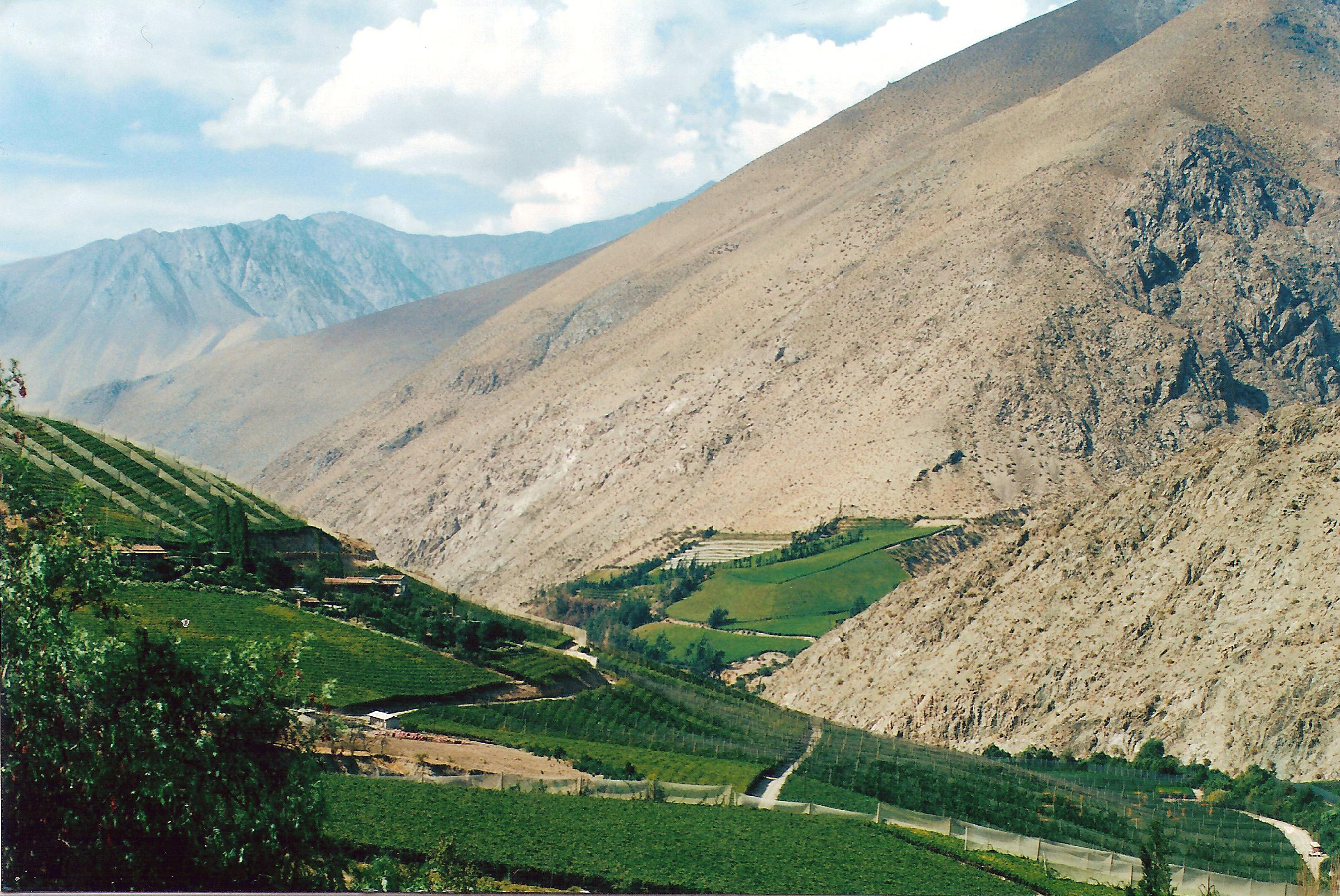 Valle del Elqui, La Serena-Chile